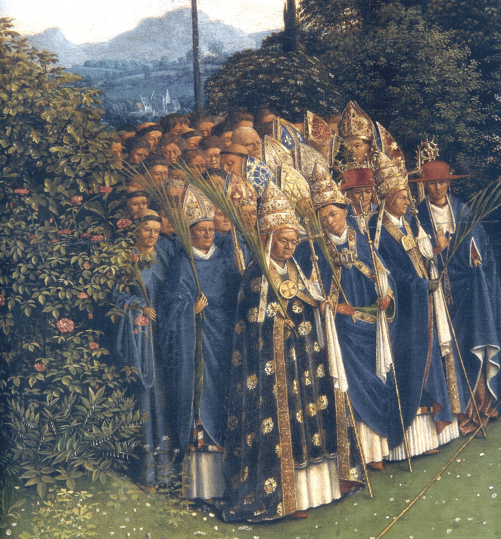 detail: clergy - closeup